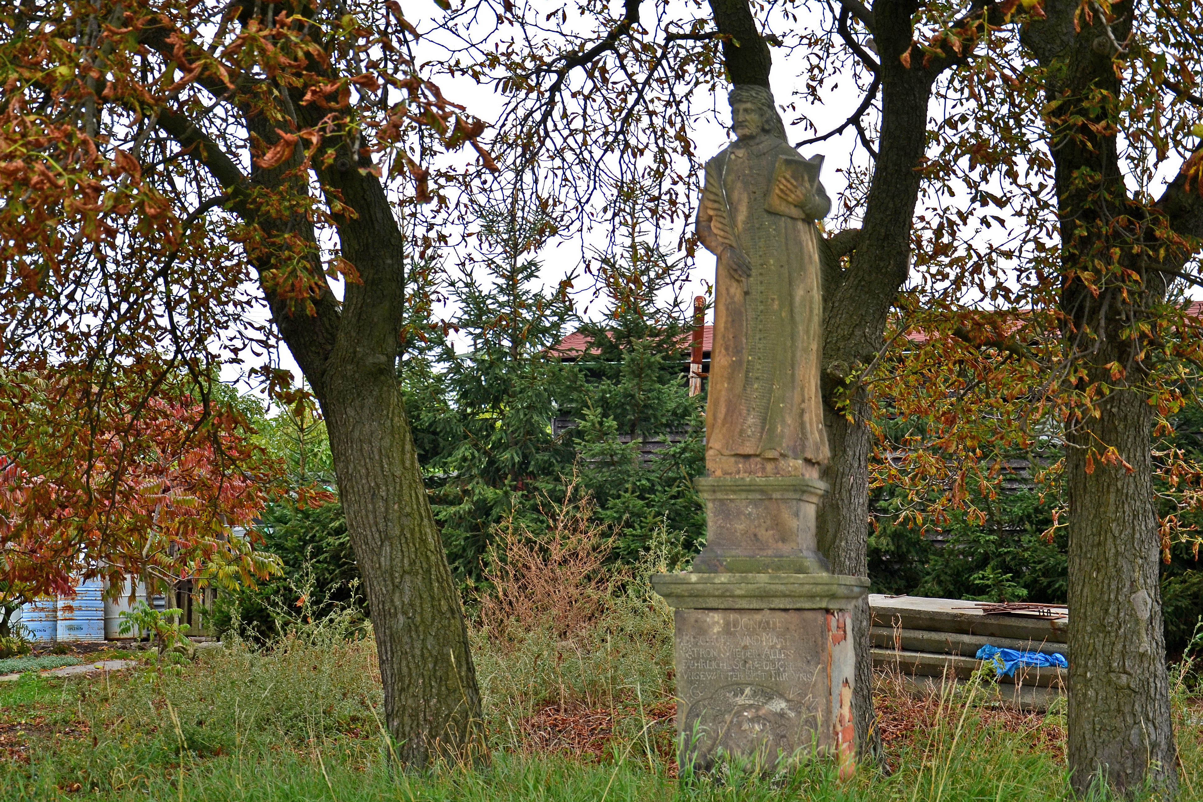 Socha svatého Donáta, Vičice.